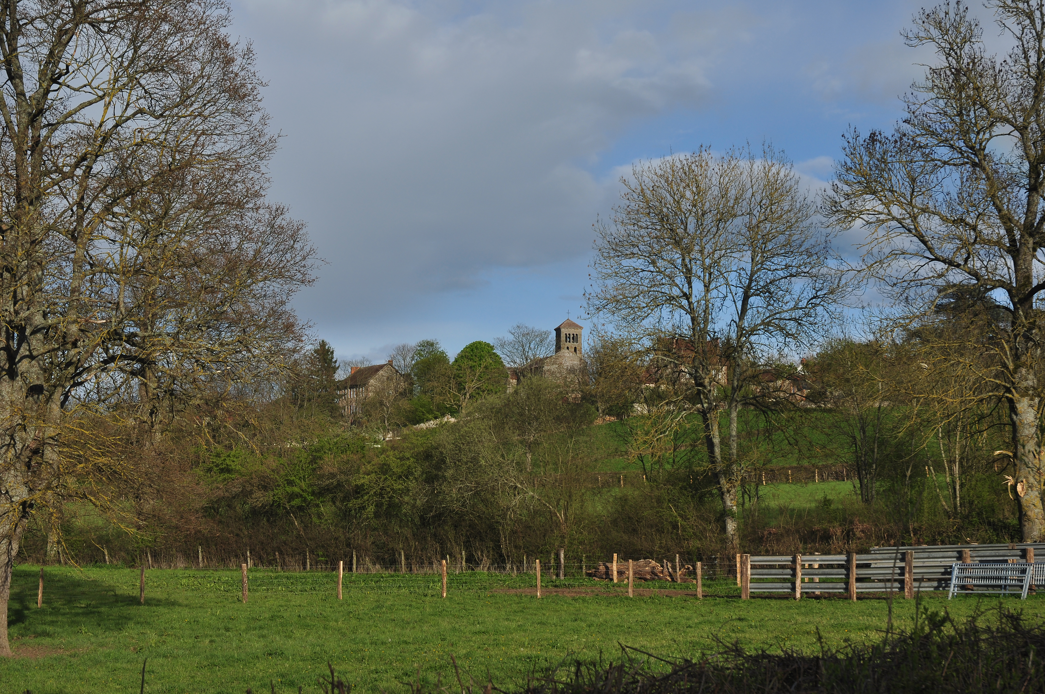 Cette photo est prise à partir du pont qui enjambe l'Ours ( nom du ruisseau).